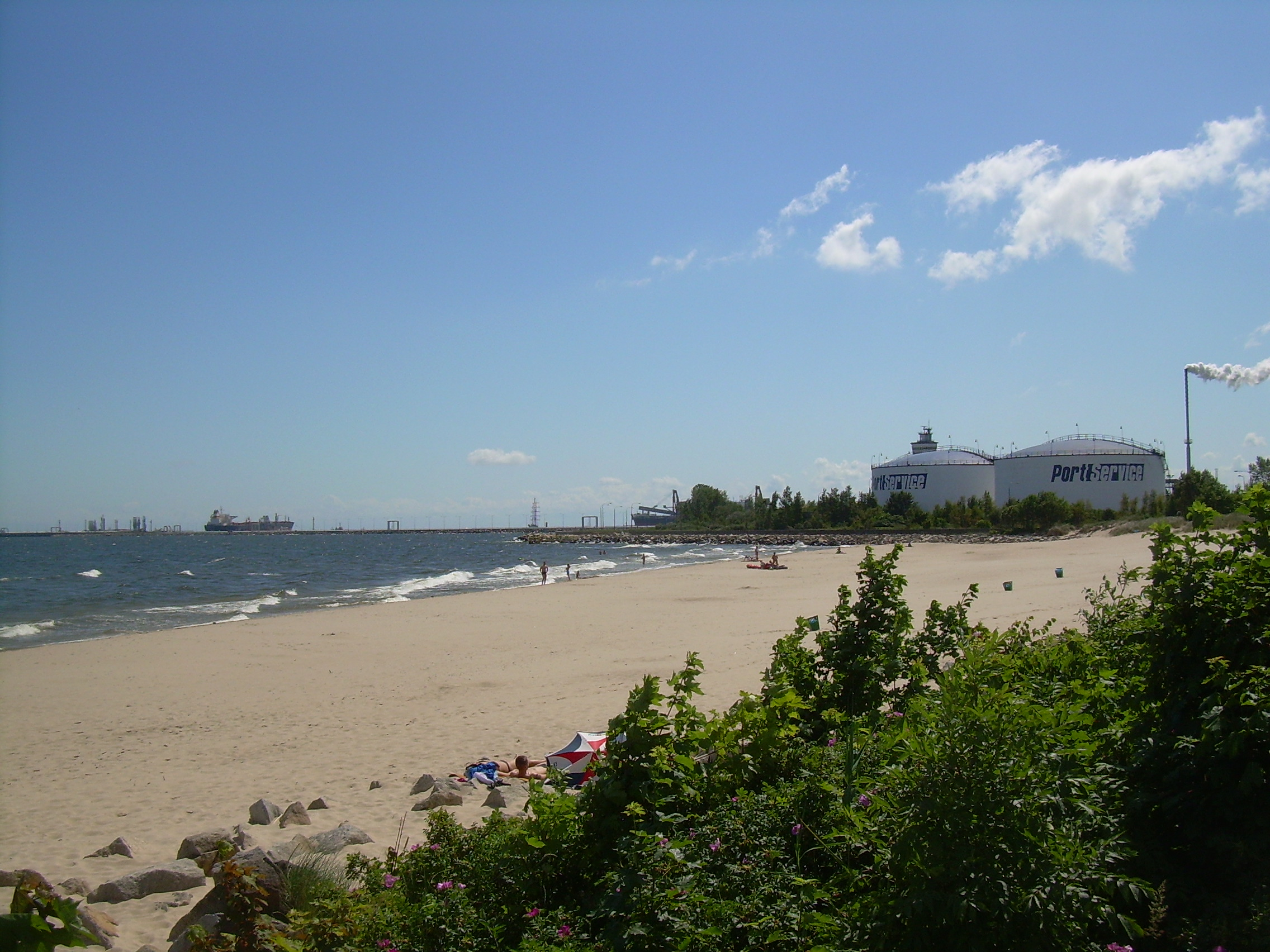 Westerplatte in Gdańsk.